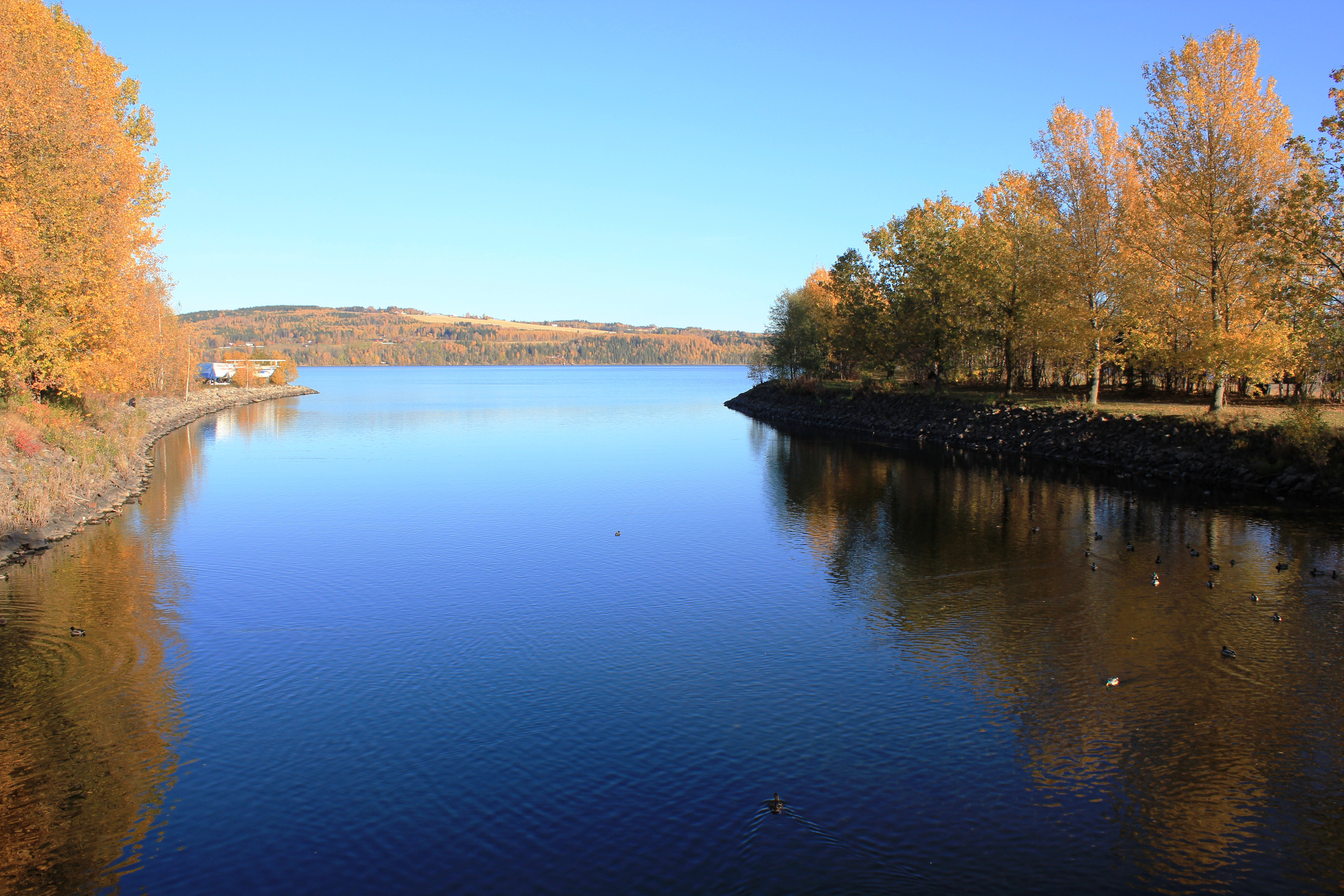 Hunnselva møter Mjøsa ved Gjøvik.